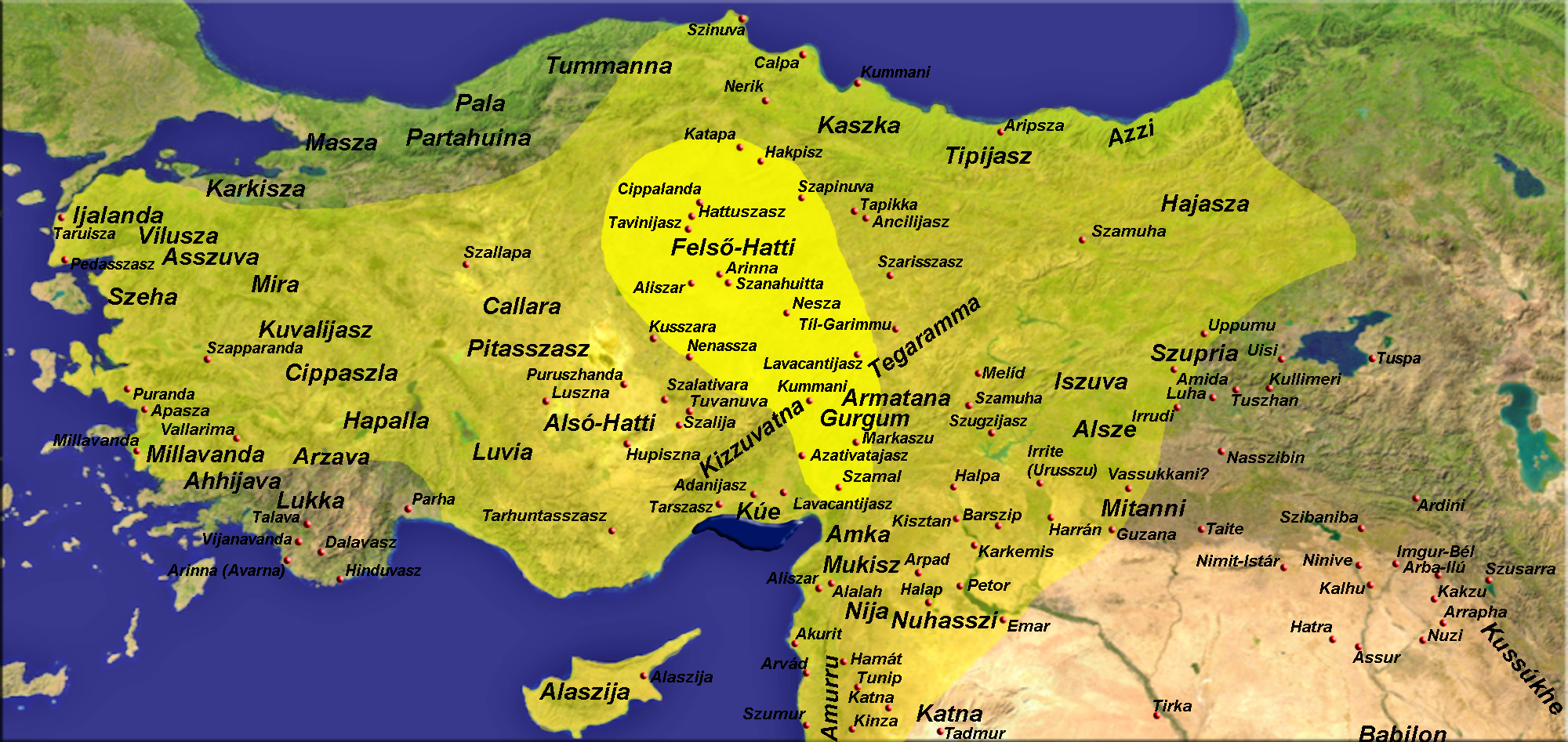 Anatólia térképe a Hettita Birodalom legnagyobb kiterjedésével